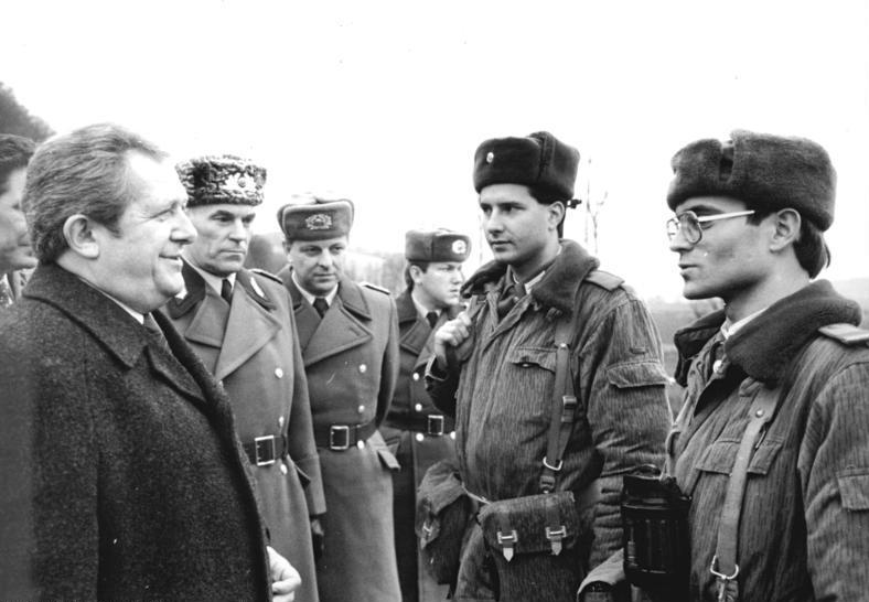 Bez.Erfurt, Gerhard Müller bei Grenztruppen ADN-ZB Ludwig-3.2.86 Bez.Erfurt: Truppenbesuch- Aus Anlaß des Jahreswechsels besuchte Gerhard Müller (l.), Kandidat des Politbüros und 1.Sekretär der SED Bezirksleitung Erfurt, am 27.12.85 die Angehörigen des Grenztruppenteils " Eugen Levenè". Dabei kam es auch zu einem Gespräch mit dem Postenführer Gefreiter Uwe Ulbricht (r.). 2.v.r.: Andreas Illgen.